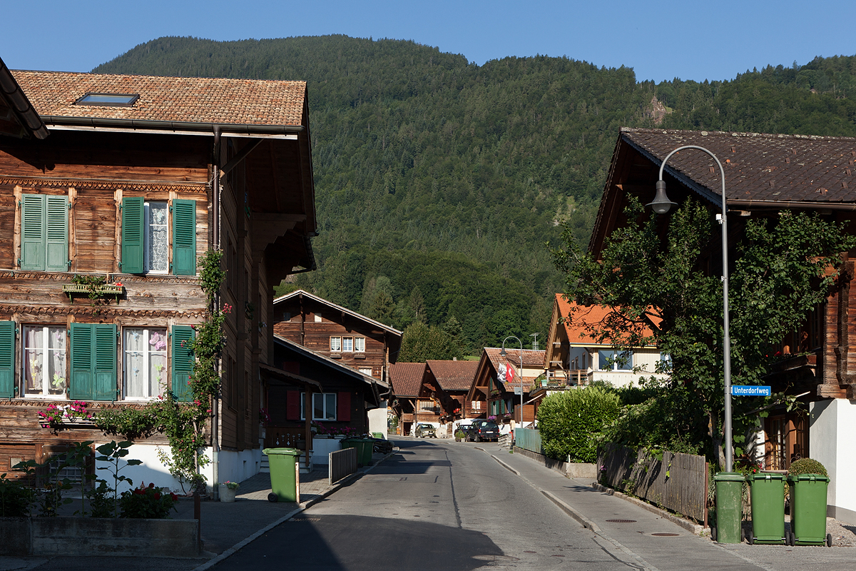 Kirchgasse mit Blick ins Oberdorf von Wilderswil